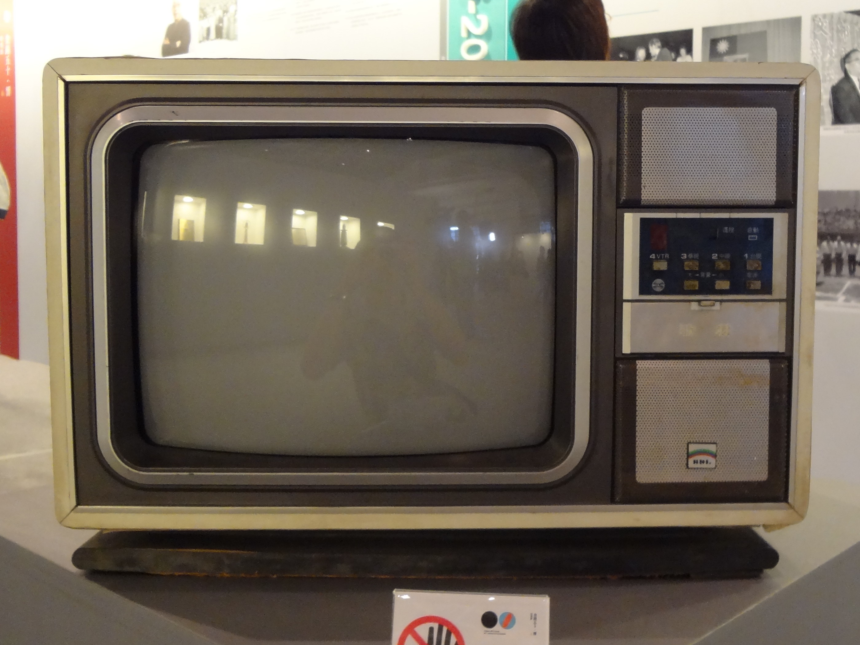 松山文化創意園區「金鐘五十．響」特別展展示品：1970年歌林14吋黑白電視機CQ-6403UR正面。